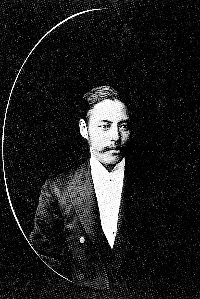 開拓使時代の村橋久成